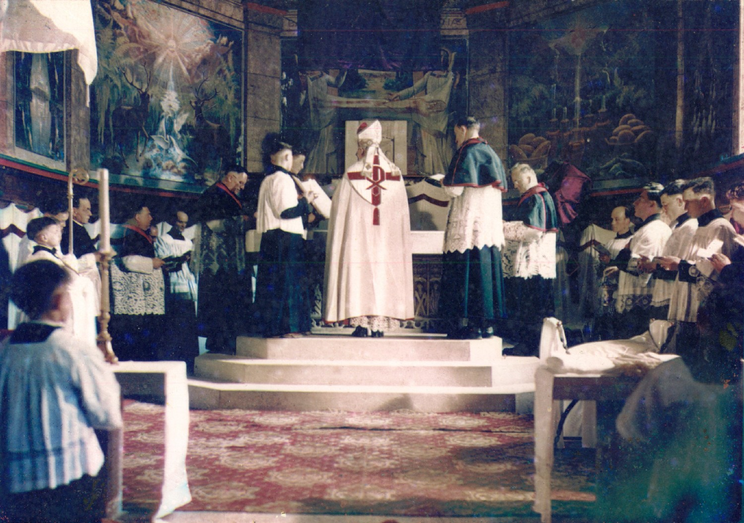 Village de Dignonville - Consécration de l'autel par Mgr Brault, en 1955